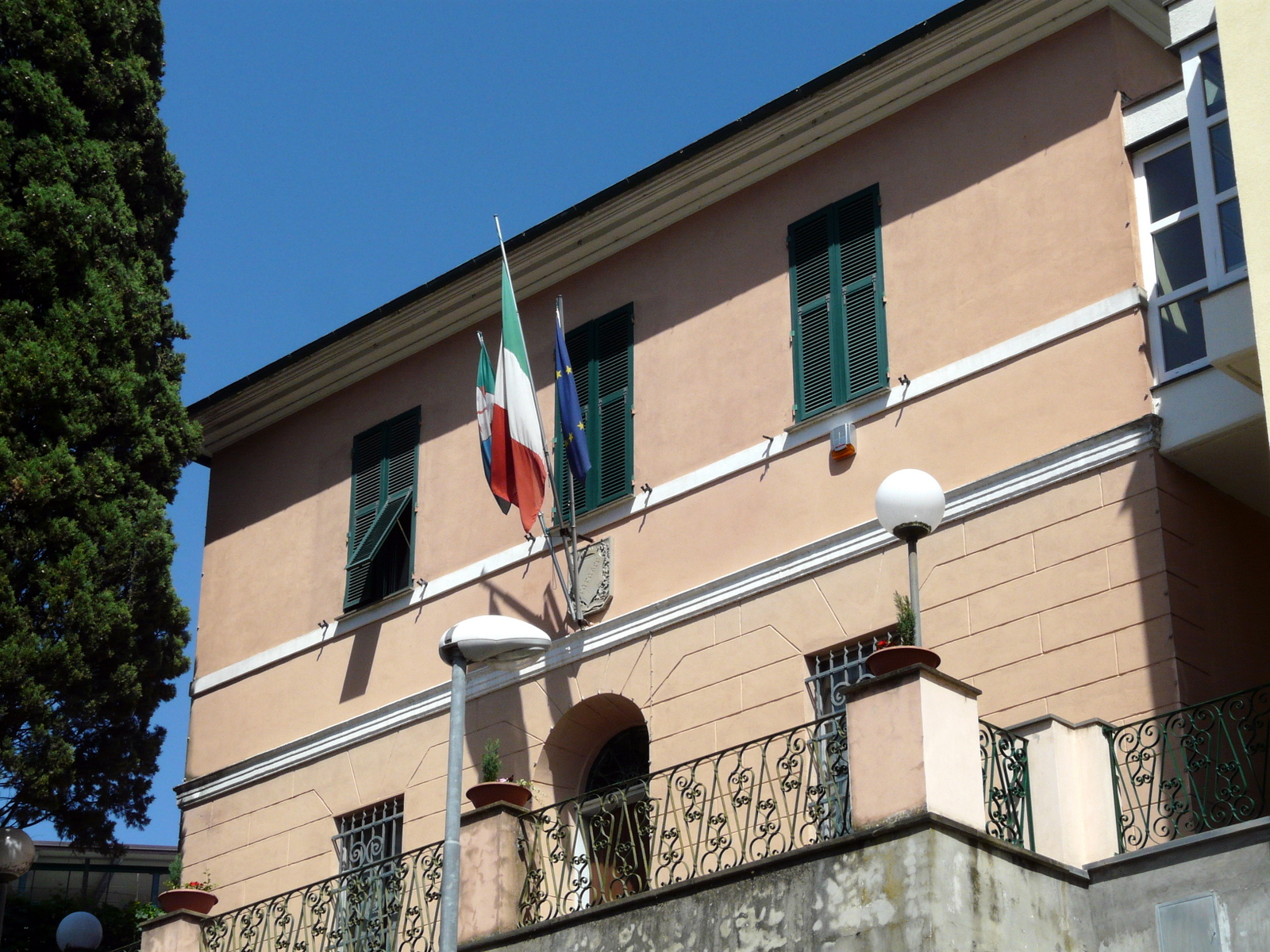 Municipio di Carasco, Liguria, Italia